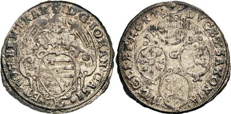 Kipper-24 Kreuzer (Sechsbätzner) o. J. (1621), Münzstätte Gotha